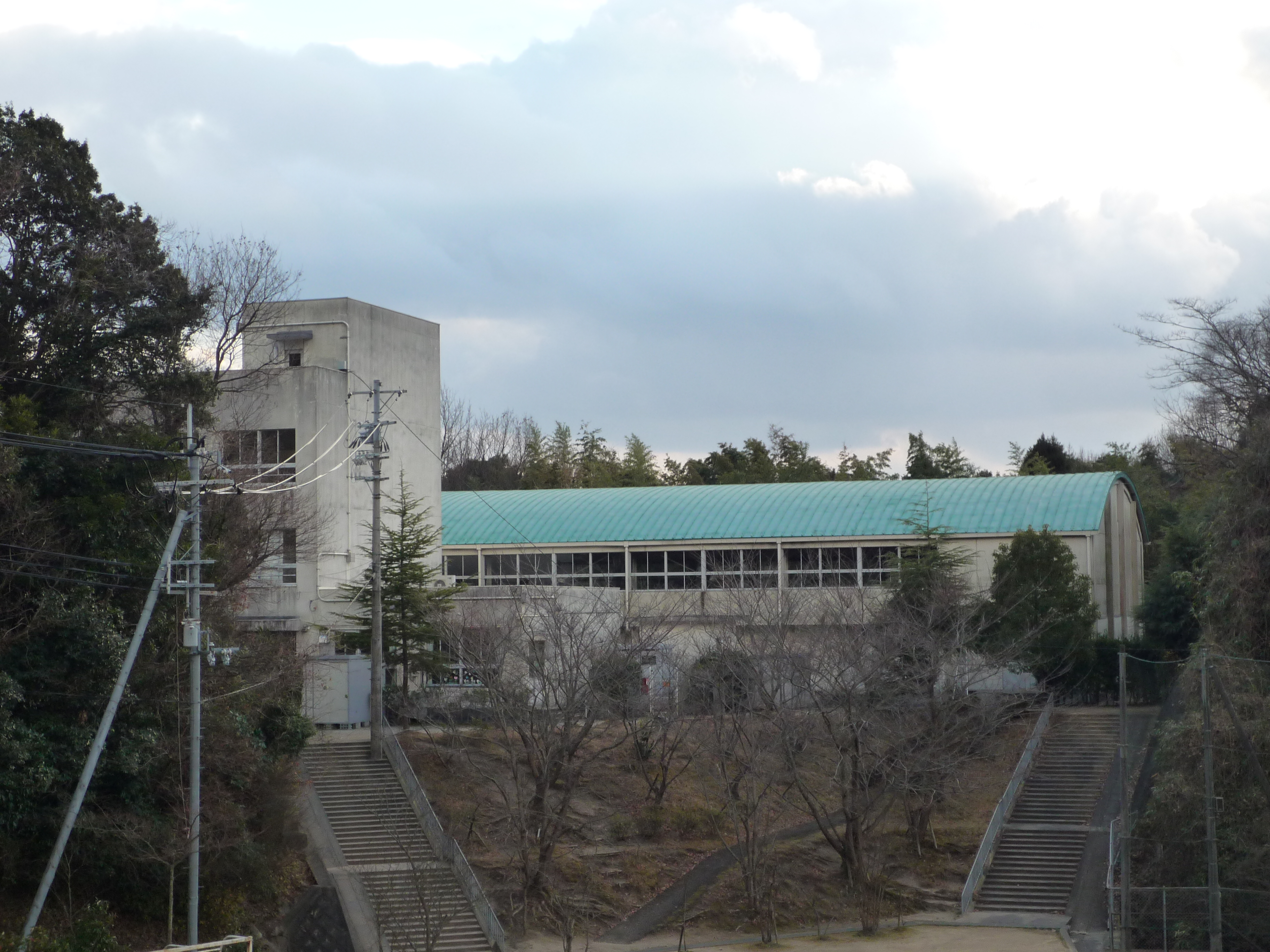 茨木市立忍頂寺小学校校舎と体育館